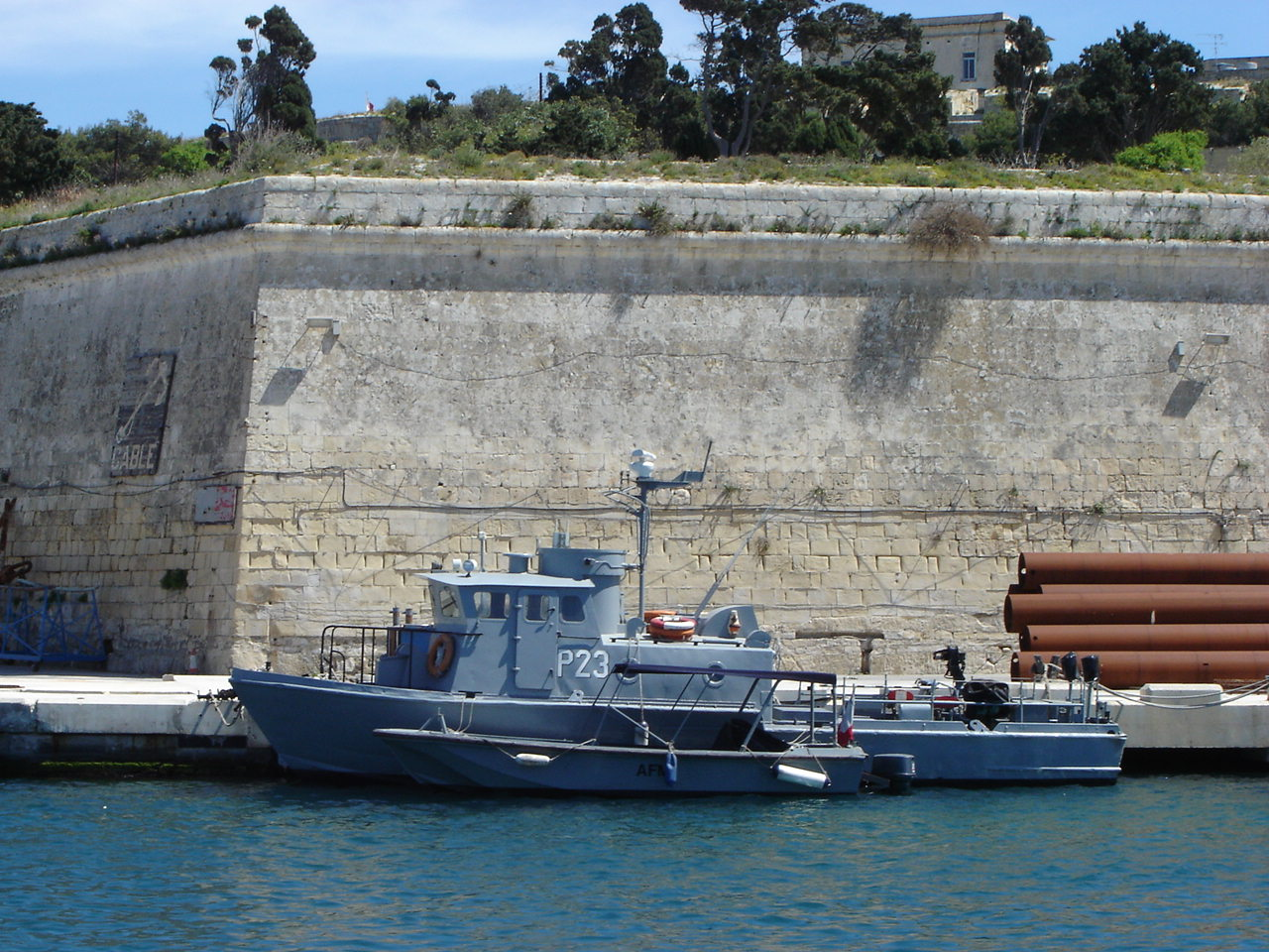 Fast Patrol Craft, auch Swift-Boat genannt, davor kleines Beiboot - Militärisches Boot. Genaue Deklaration vonnöten, daher Hochladung hier. Malta April 2006.